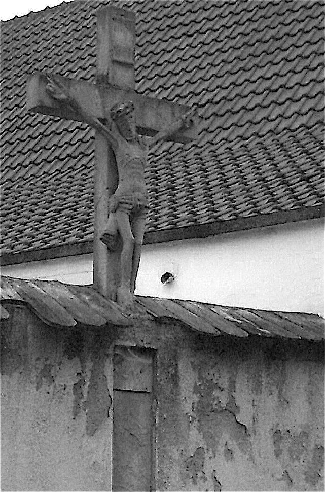 Erstein (France) : Croix, rue du monastère (1746)